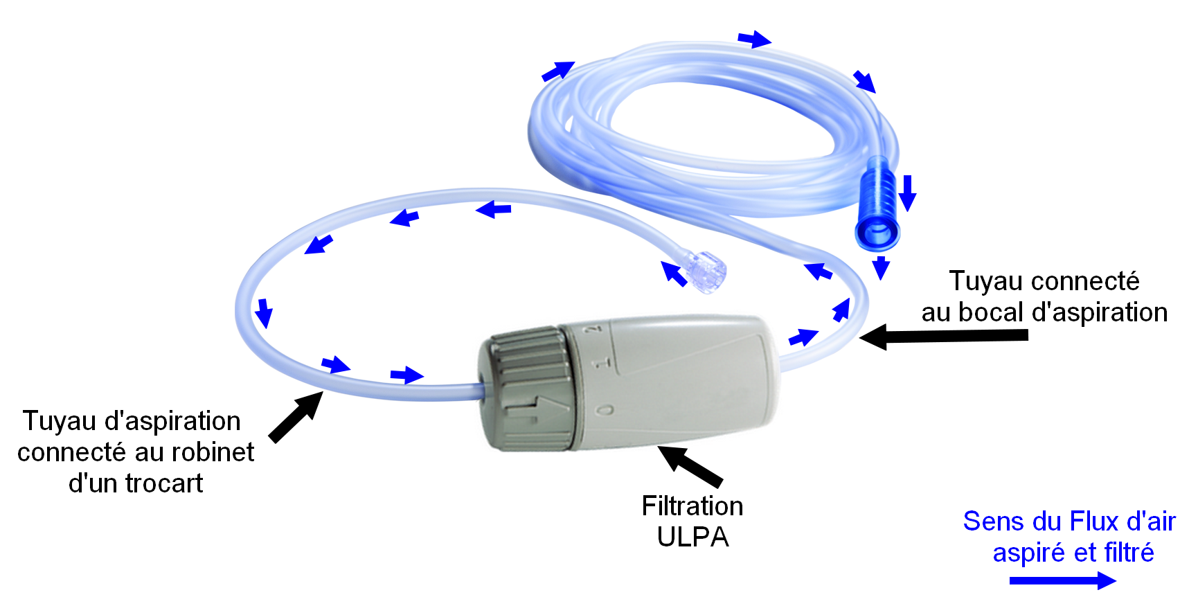 Évacuateur de fumées chirurgicales pour la coelioscopie